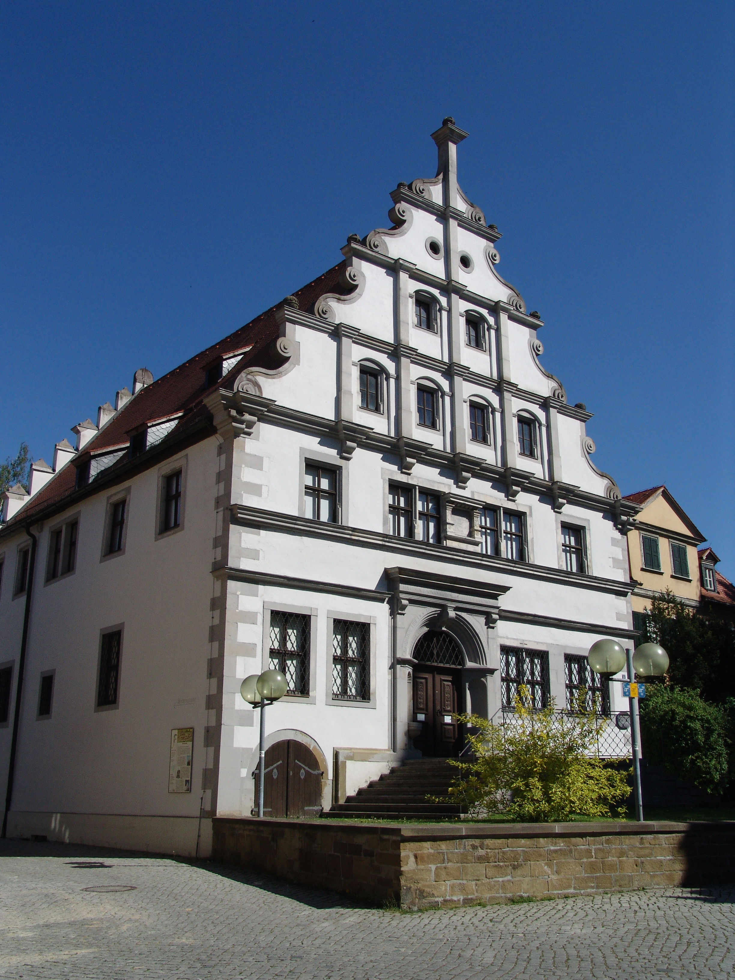 Schweinfurt - Altes Gymnasium